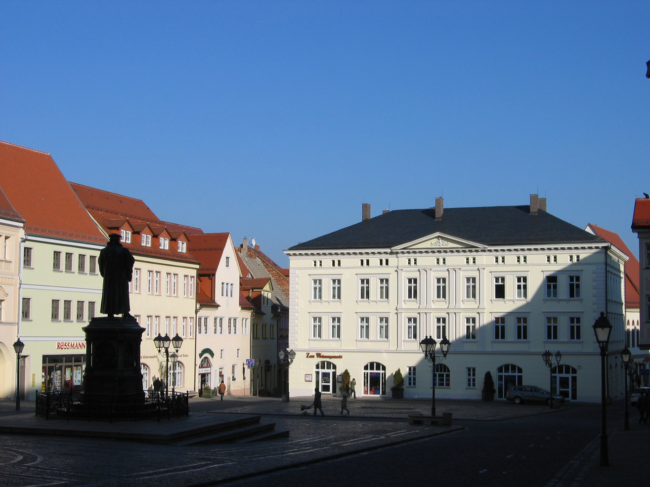 Lutherstadt Eisleben: Marktplatz von Westen mit der Alten Waage